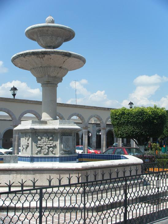 Fuente del atrio Uriangato